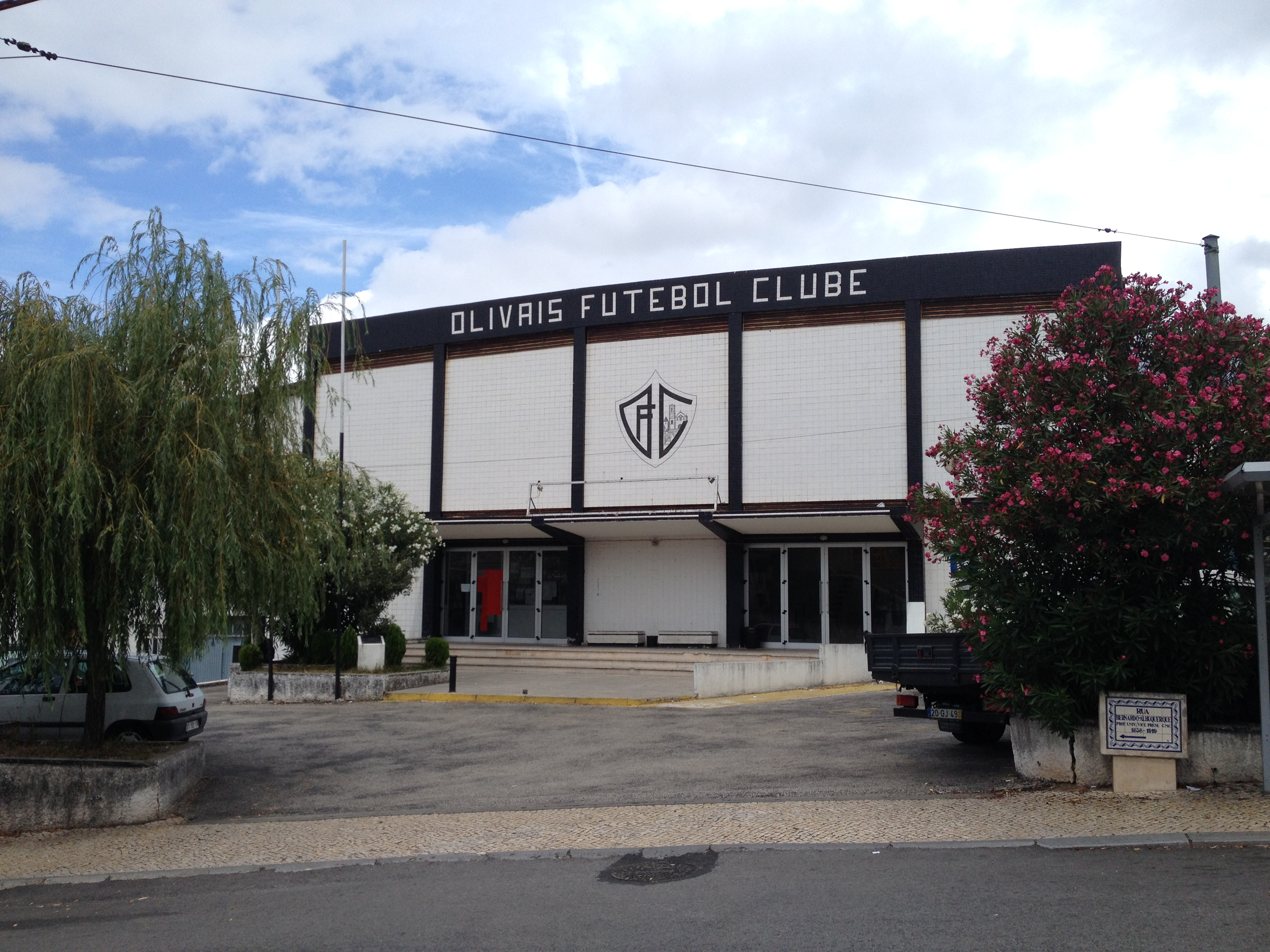 Este é o Pavilhão Eng. Augusto Correia (Sto António dos Olivais, Coimbra) onde o Olivais Futebol Clube treina e joga.